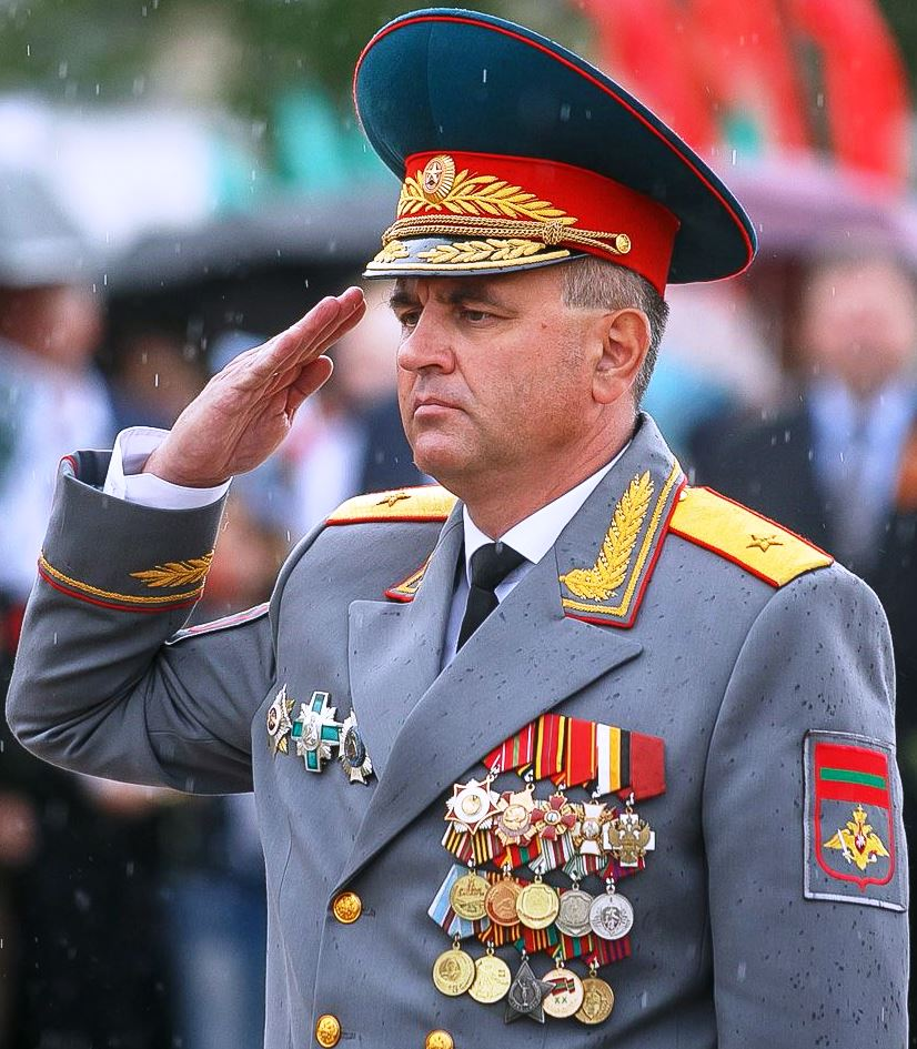 Вадим Николаевич Красносельский (род. 1970) — приднестровский государственный и политический деятель